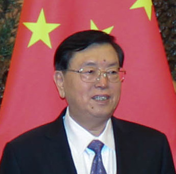 2018.gada 9.janvāris. Saeimas priekšsēdētāja Ināra Mūrniece kopā ar citu NB8 valstu parlamentu spīkeriem kopīgās vizītes Ķīnā ietvaros tiekas ar Ķīnas Nacionālā tautas kongresa Pastāvīgās komitejas priekšsēdētāju Džanu Dedzjanu (Zhang Dejiang). Foto: Guntra Riņķe, Saeima Izmantošanas noteikumi: saeima.lv/lv/autortiesibas